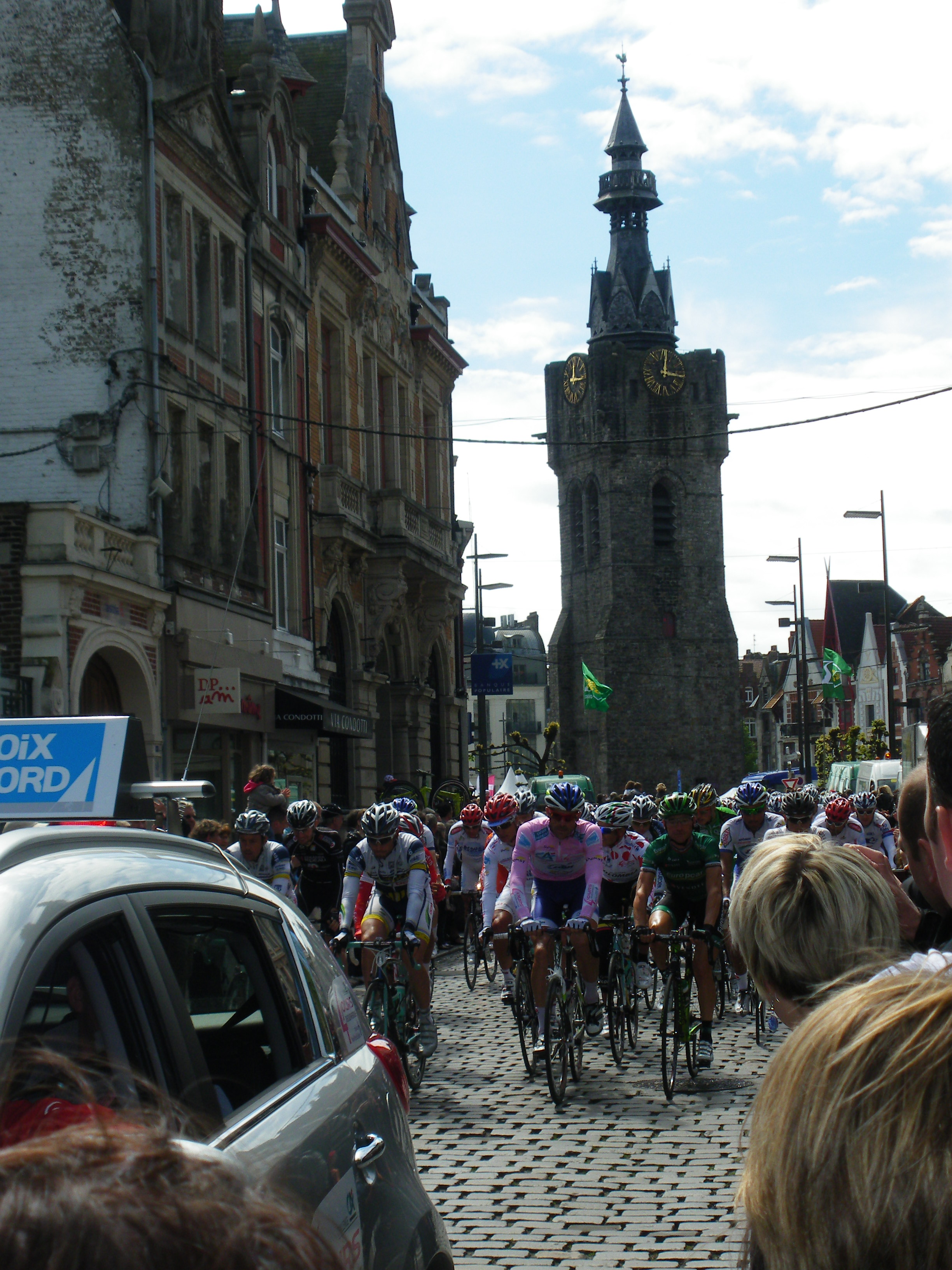 Départ à Béthune de la dernière étape des Quatre jours de Dunkerque 2012. En tête de course est présent le maillot rose Jimmy Engoulvent.